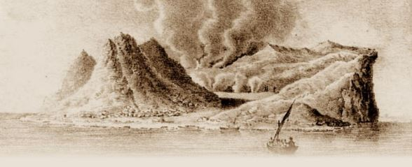 Landscape of Isola Ferdinandea, before to be destroyed.